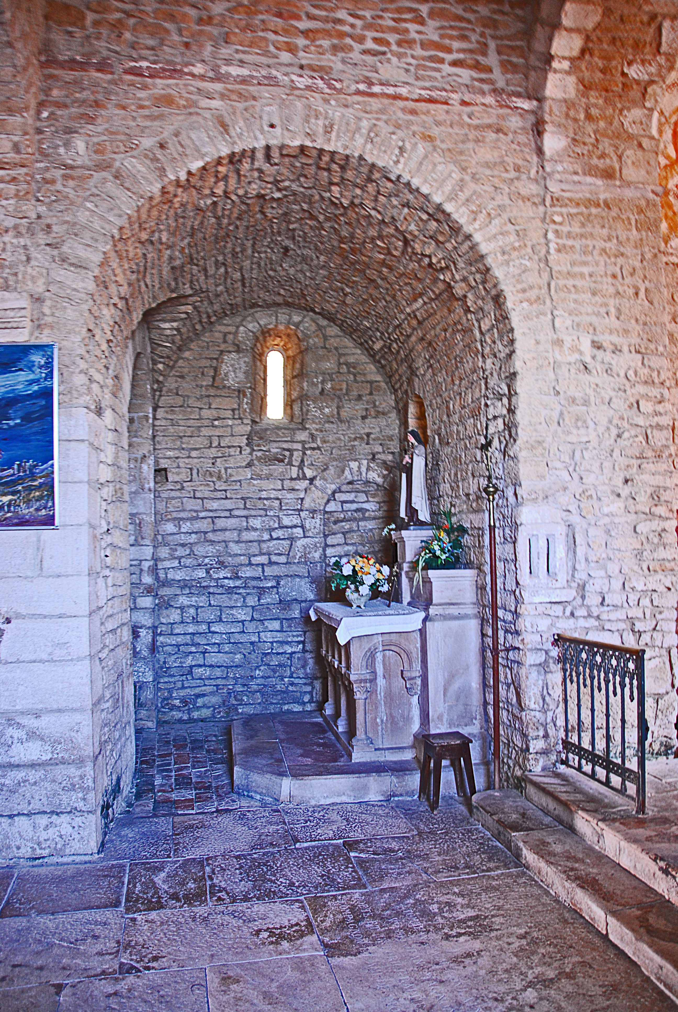 St-Bathélémy, Farges, nördl. Querhausarm